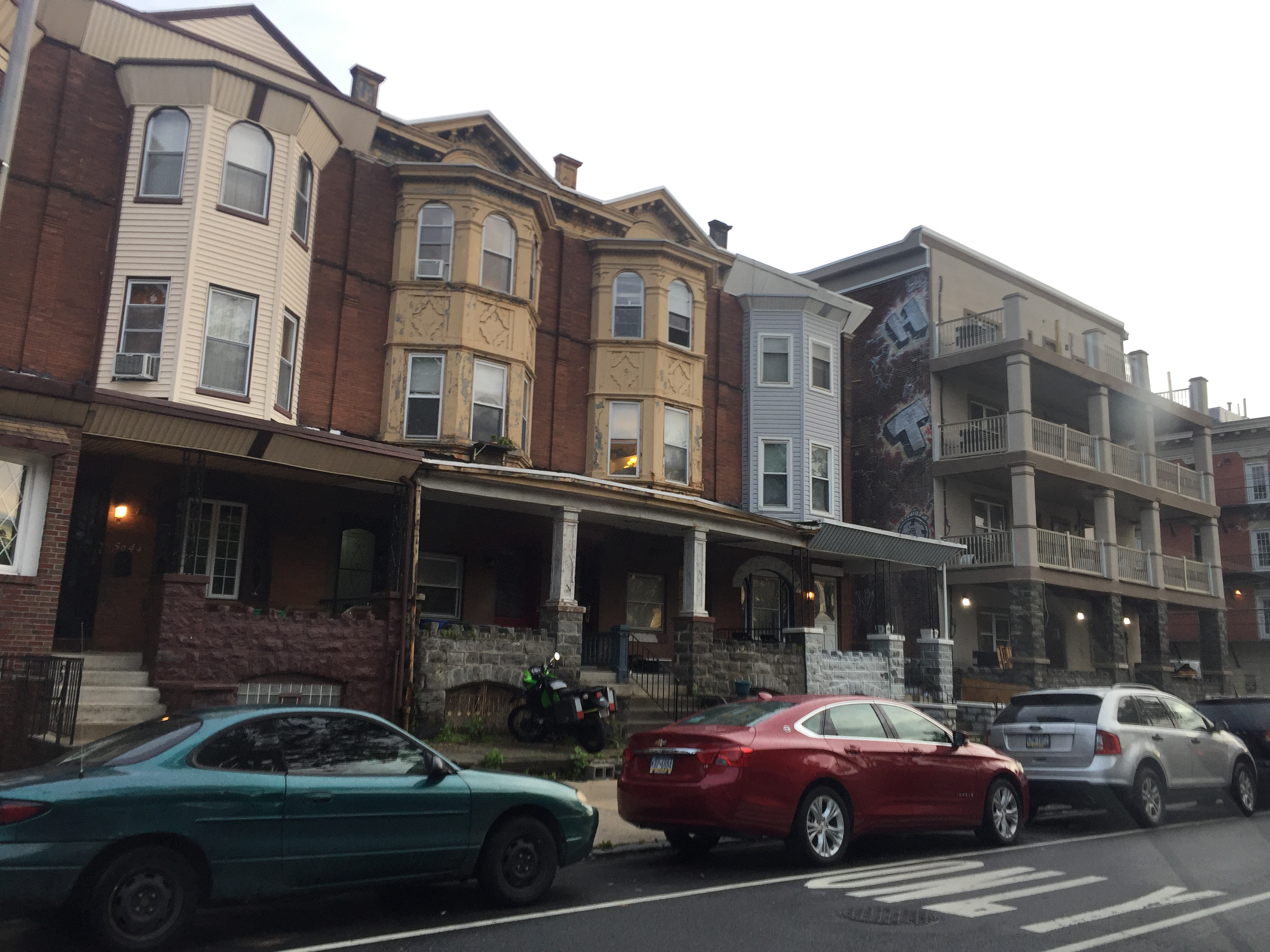 Dunlap neighborhood houses